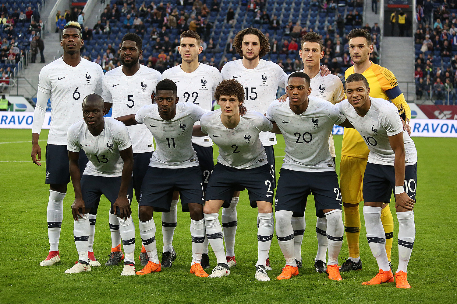 Сборная России проиграла французам